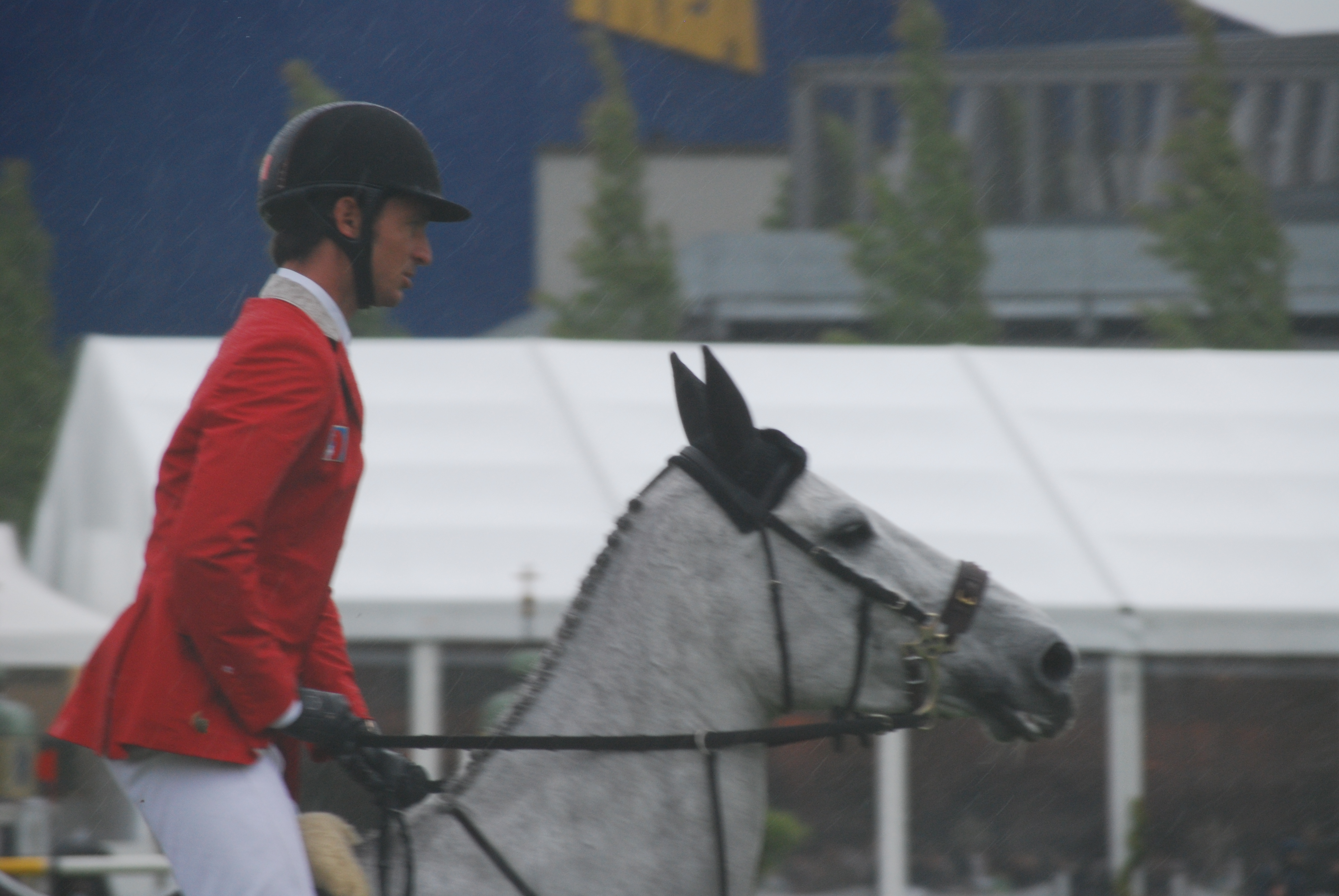 Steve Guerdat auf Nasa am CSIO in St. Gallen